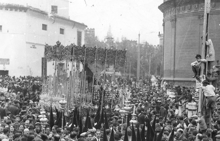 Imagen de María Santísima de la Esperanza Macarena de Sevilla bajo palio en su estación de penitencia en el año 1928.